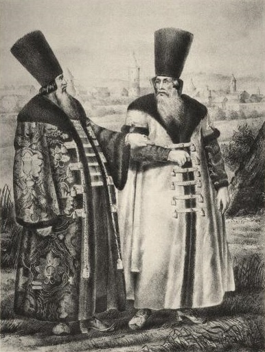 Русская одежда в XIV до XVIII столетия, турские шубы и горлатные шапки.